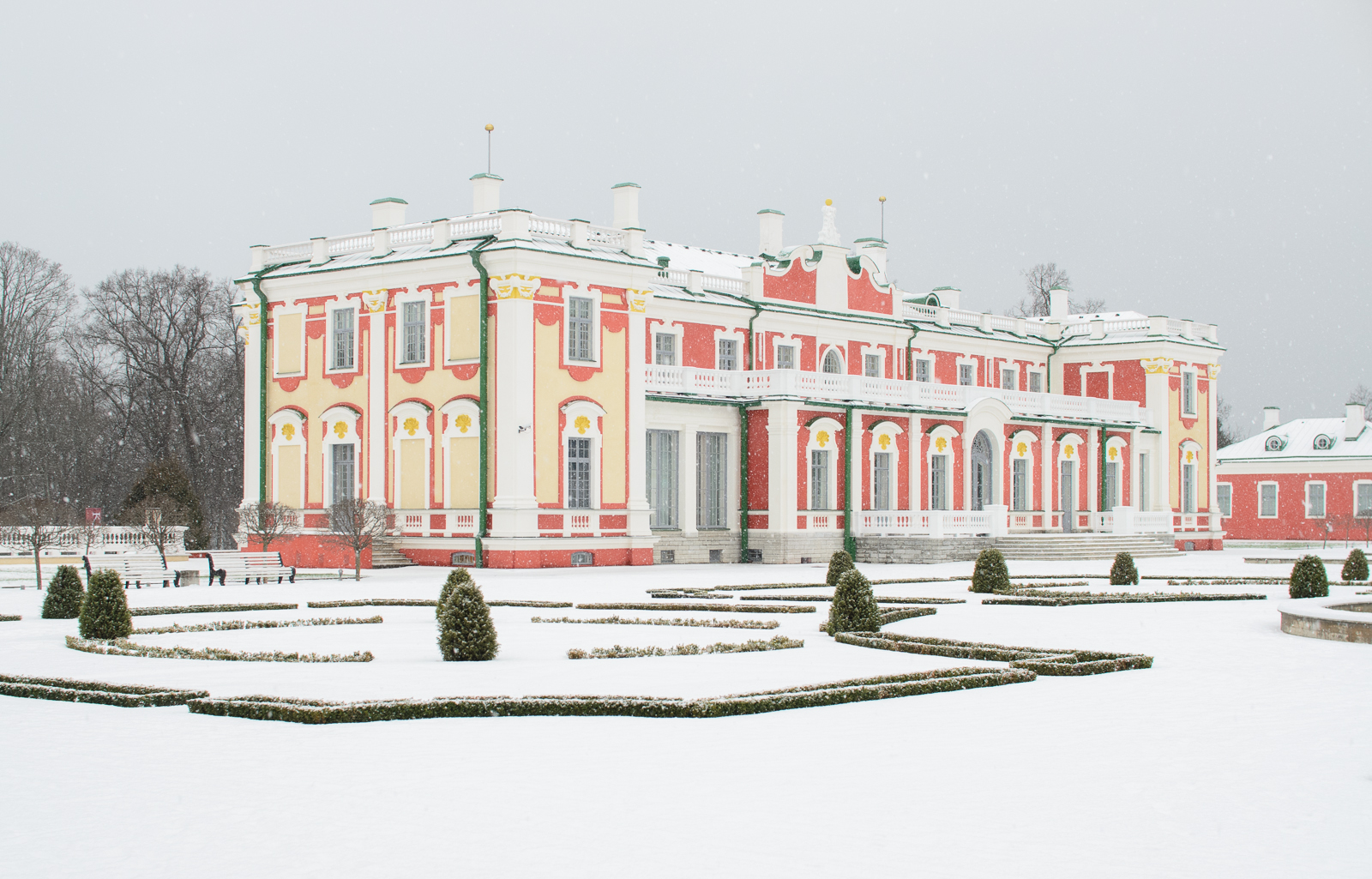 Kadrioru loss